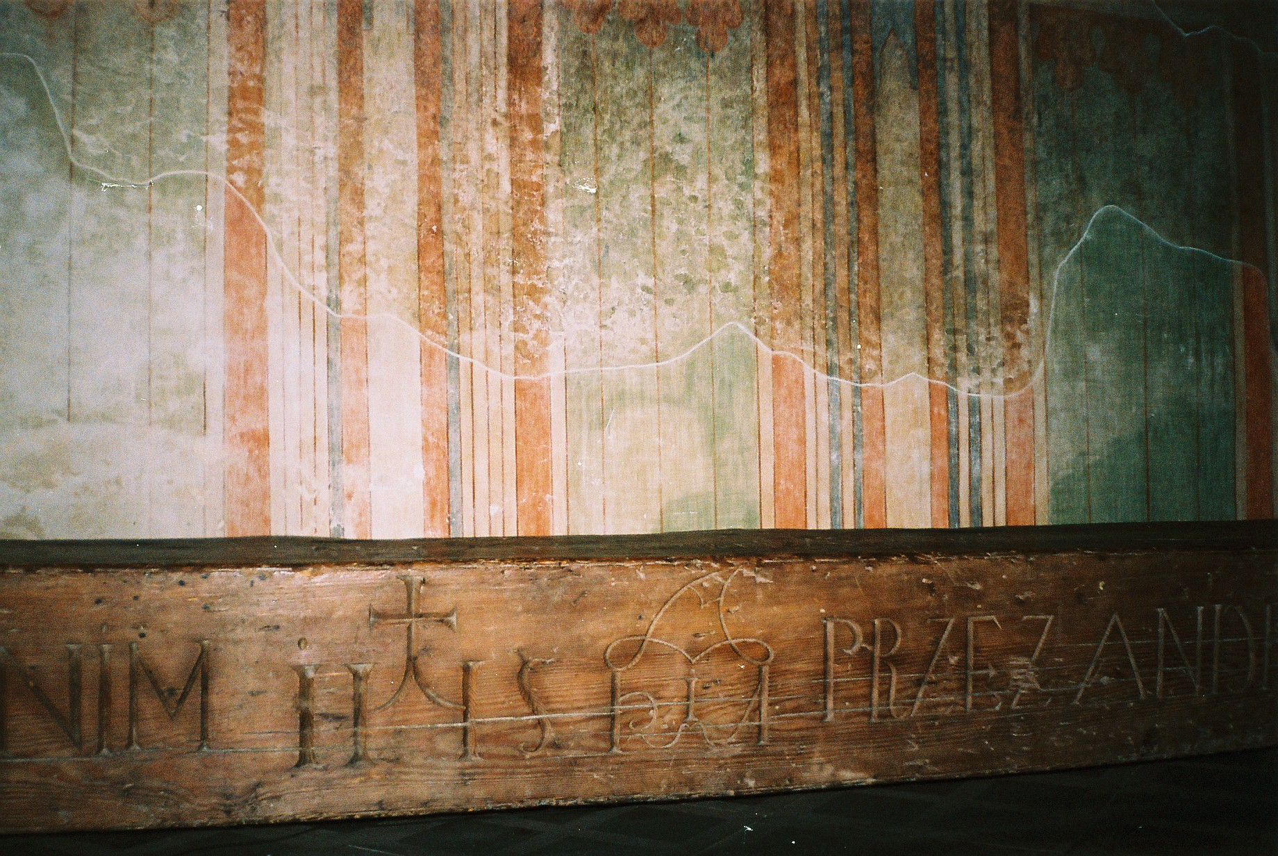 wnętrze kamienicy Gruszewiczów 3